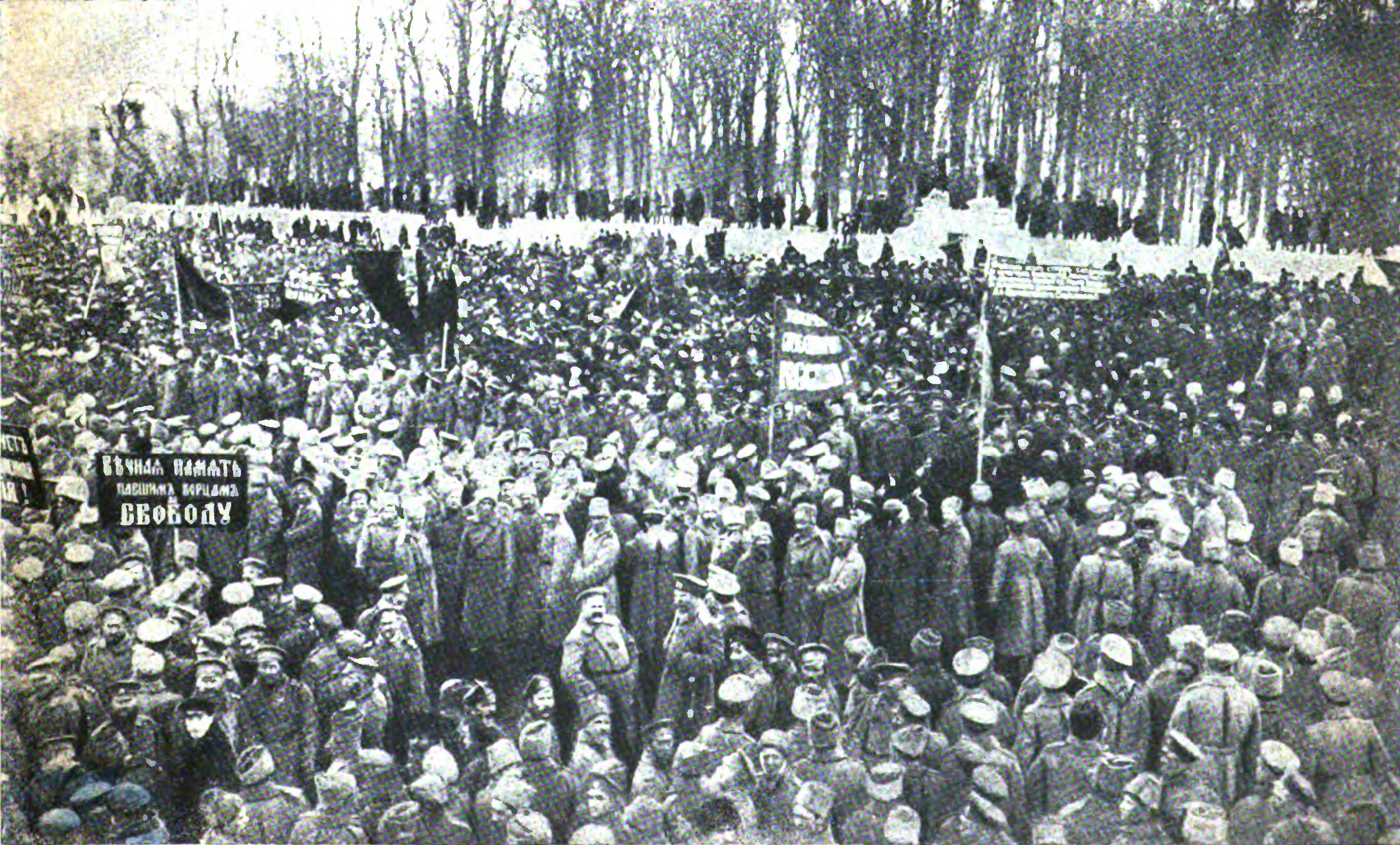 Беларуская (тарашкевіца): Гомель (Homiel), пляц Рынак (plac Rynak) або Саборны (plac Saborny). Мітынг